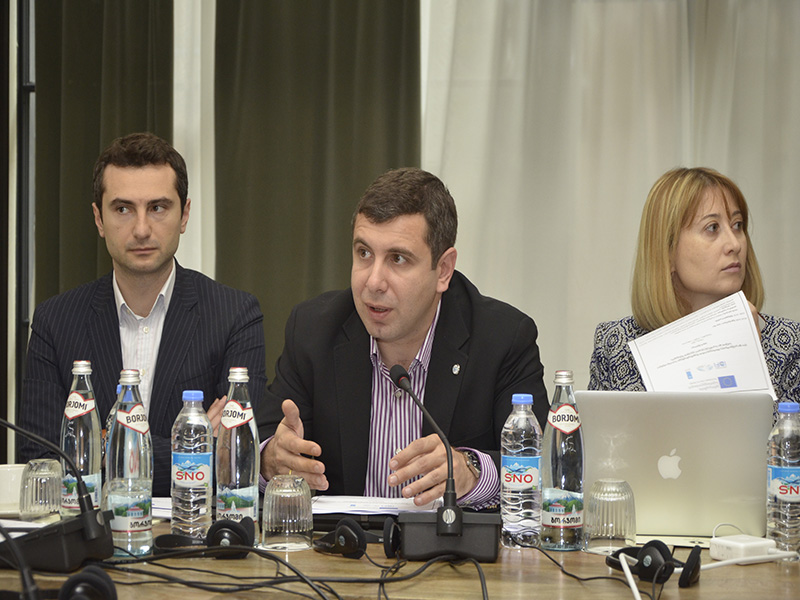 საქართველოს საპარლამენტო ღიაობის 2017-2018 წლების სამოქმედო გეგმა დამტკიცდა